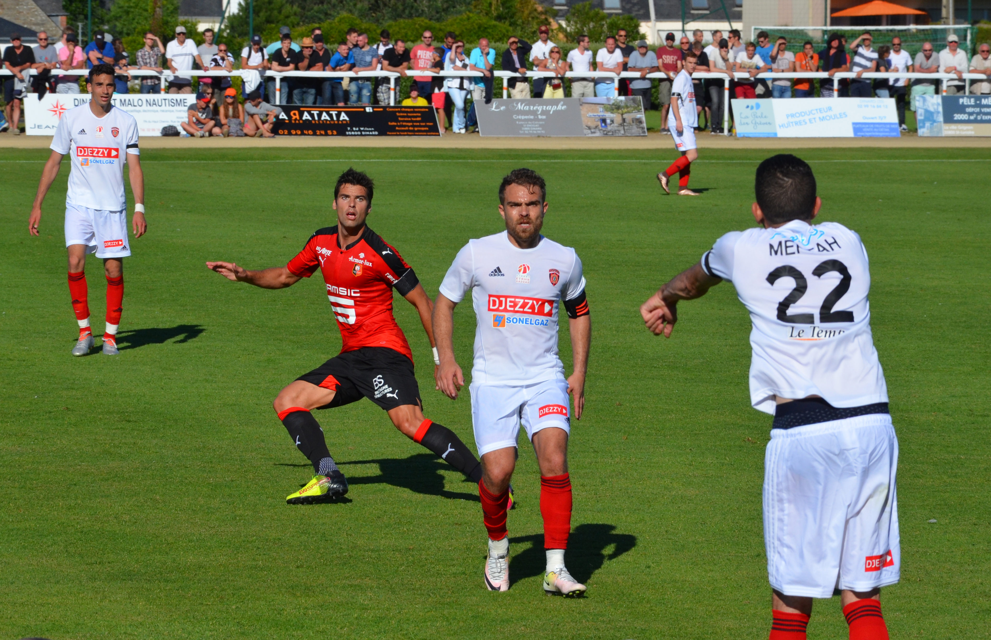 Photographie prise lors du match opposant le Stade rennais à l'USM Alger en match amical au stade Paul-Audrin de Dinard le 16 juillet 2016. Ici, touche réalisée par Mohamed Meftah devant Hamza Koudri et Yoann Gourcuff.